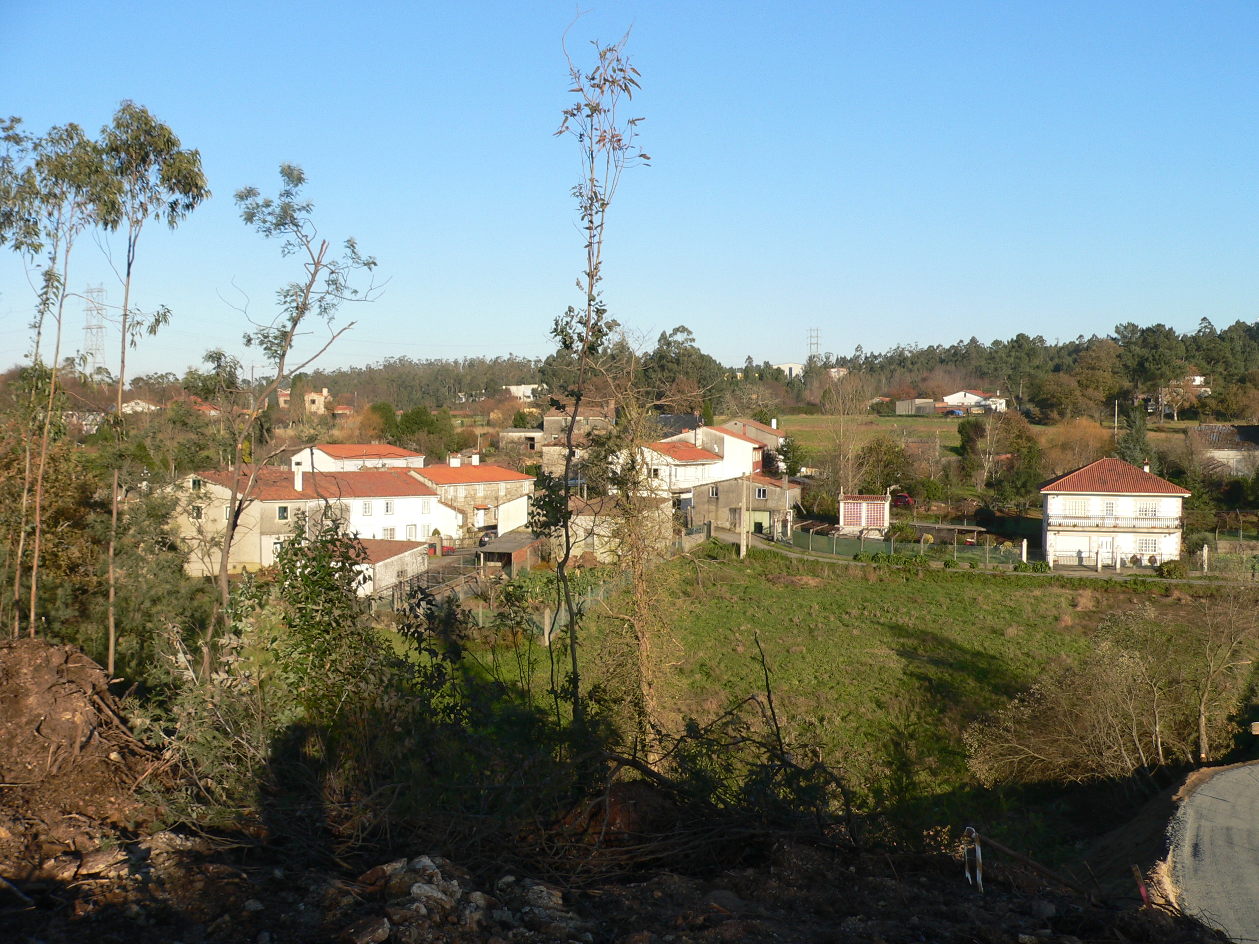 Paramuiño Ames